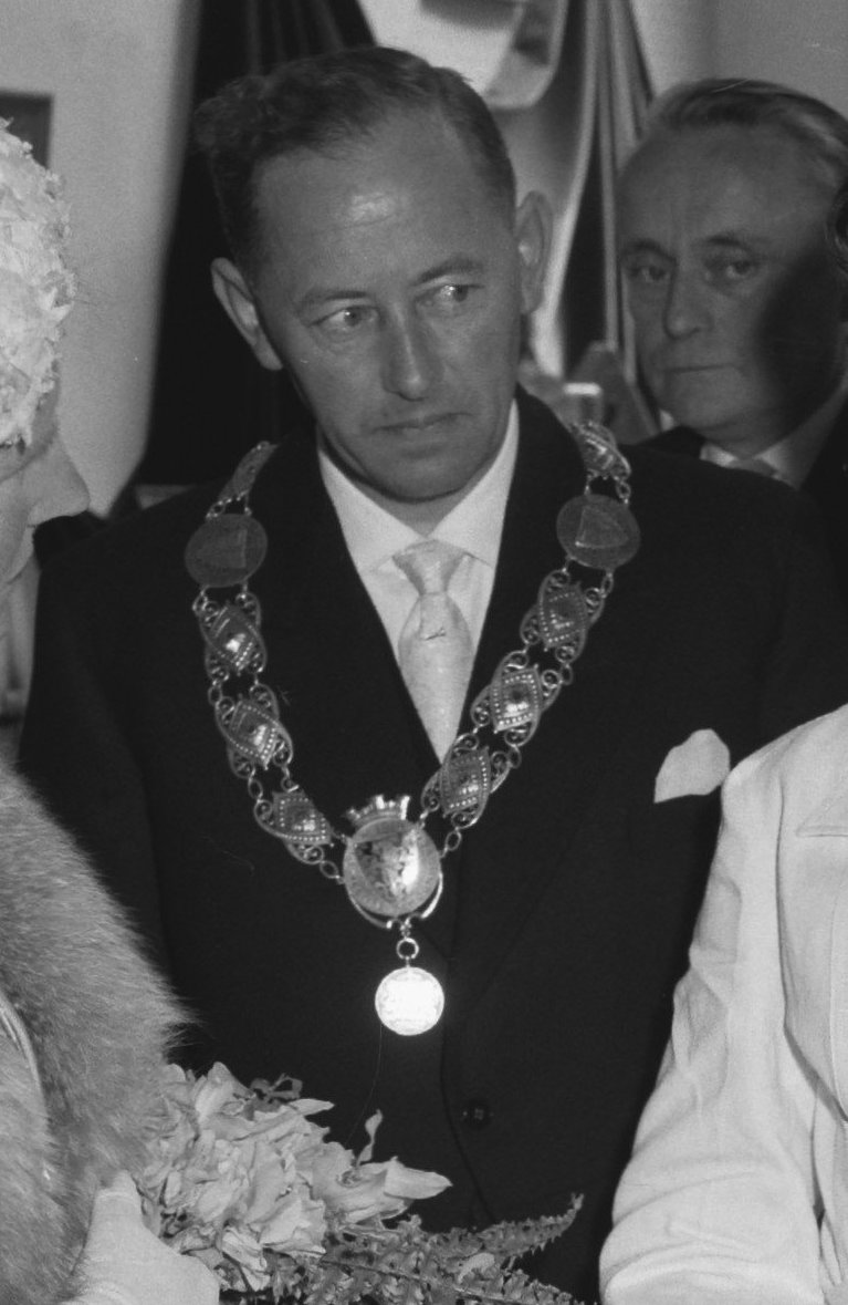 Collectie / Archief : Fotocollectie Anefo Reportage / Serie : [ onbekend ] Beschrijving : koningin Juliana bezoekt de stormvloedkering te Krimpen aan den IJssel Datum : 21 mei 1958 Locatie : Krimpen aan den IJssel, Zuid-Holland Trefwoorden : bezoeken, koninginnen, koninklijk huis Persoonsnaam : Juliana (koningin Nederland), Juliana, koningin Fotograaf : Behrens, Herbert / Anefo Auteursrechthebbende : Nationaal Archief Materiaalsoort : Negatief (zwart/wit) Nummer archiefinventaris : bekijk toegang 2.24.01.04 Bestanddeelnummer : 909-5874